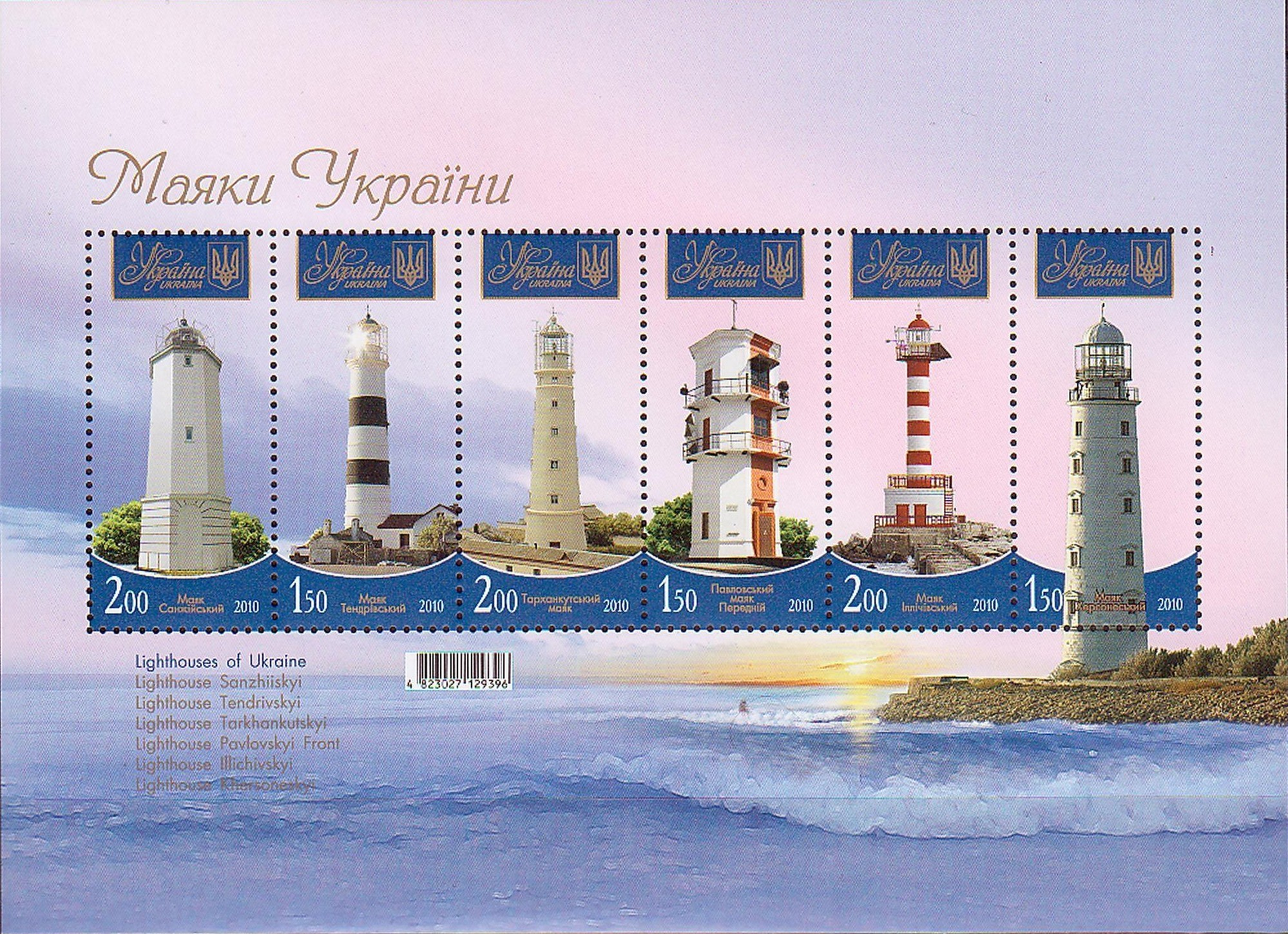 Поштовий блок “Маяки України” 2010 року випуску